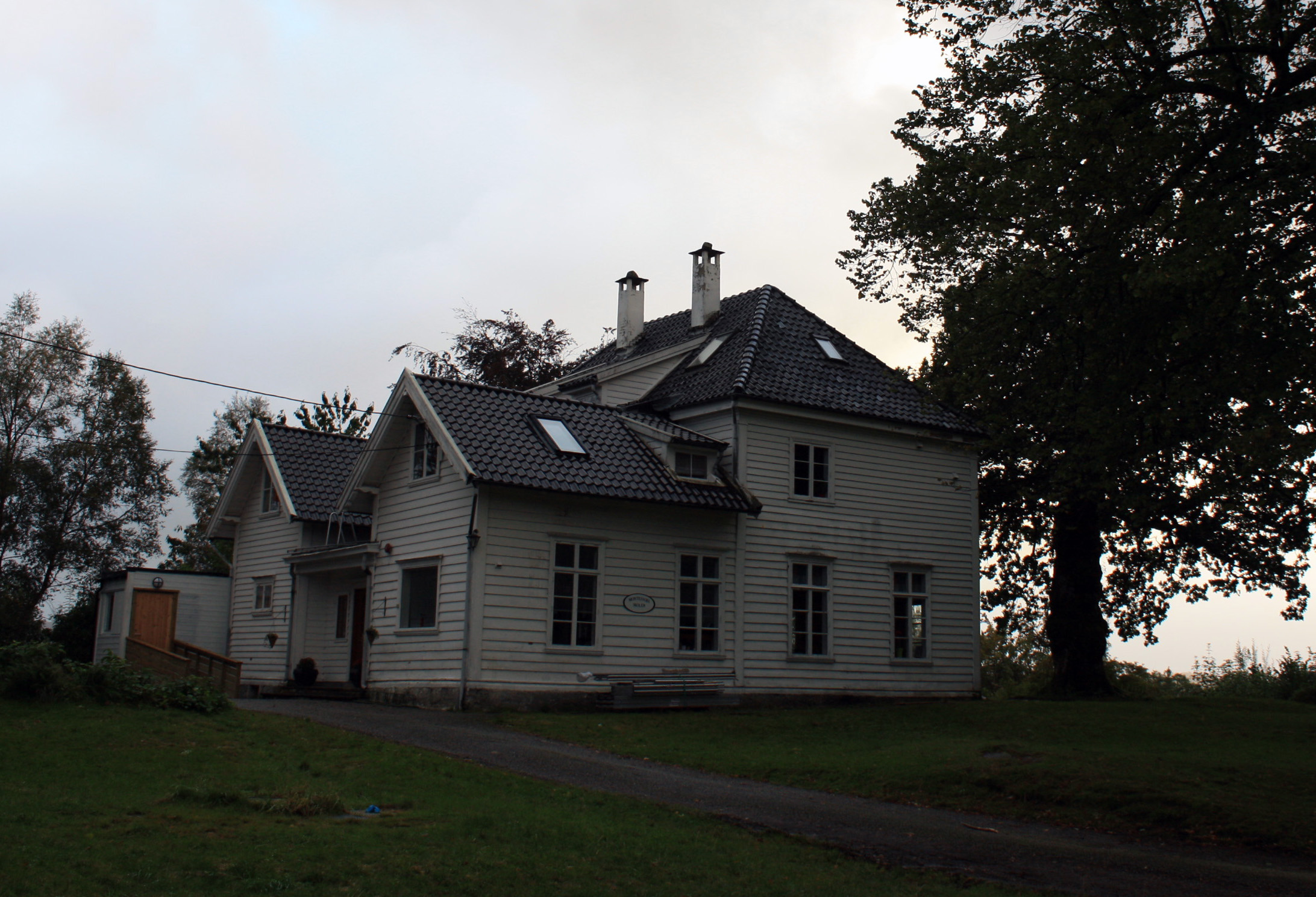 Montessorigrunnskolen i Bergen, Fana, Bergen.